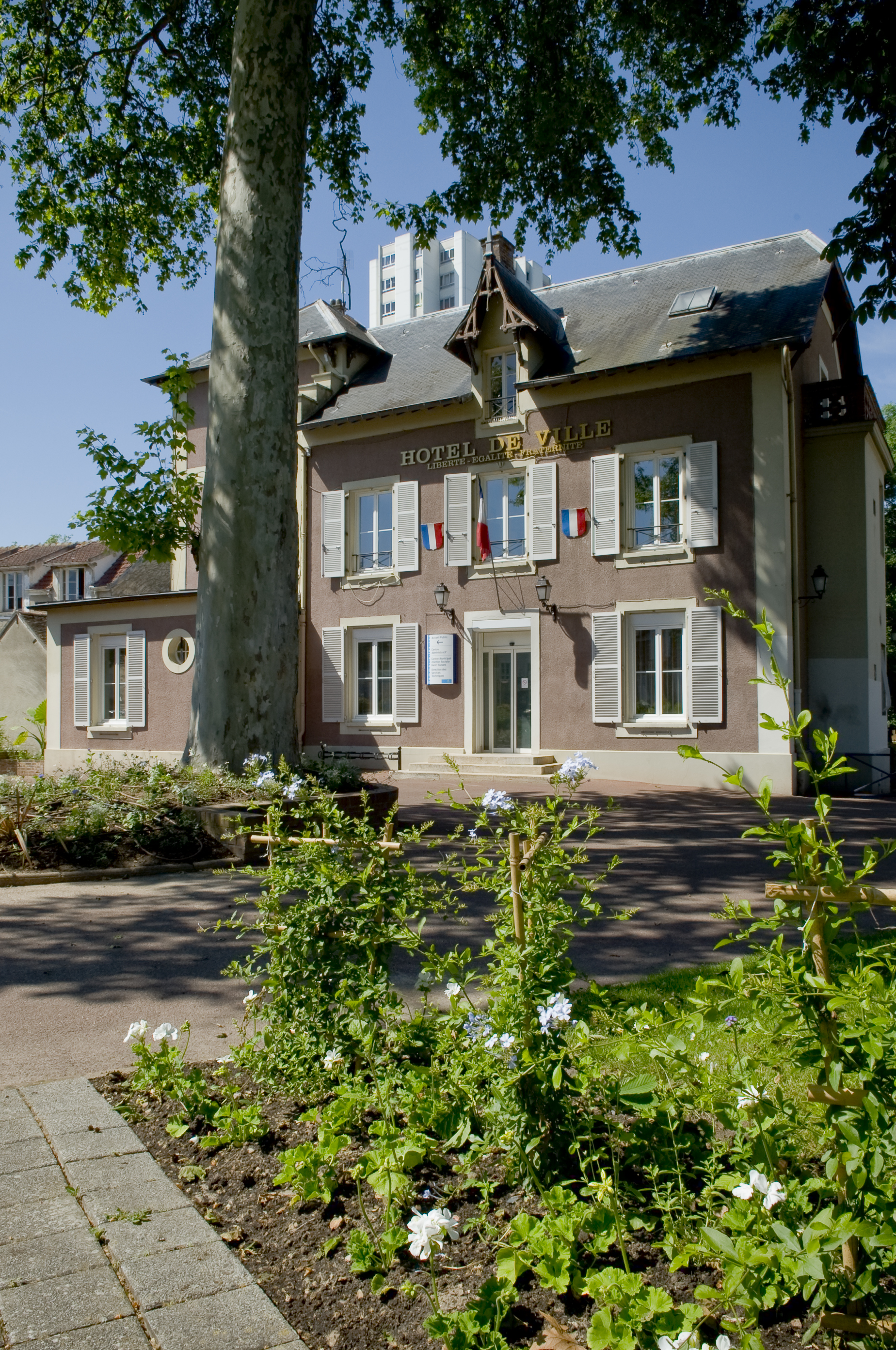 Mairie de Dammarie-Lès-Lys